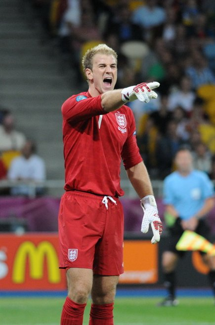 Джо Харт.